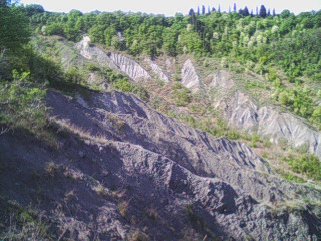 Badlands, area near Bologna, Monte Calvo (Pianoro and San Lazzaro di Savena)